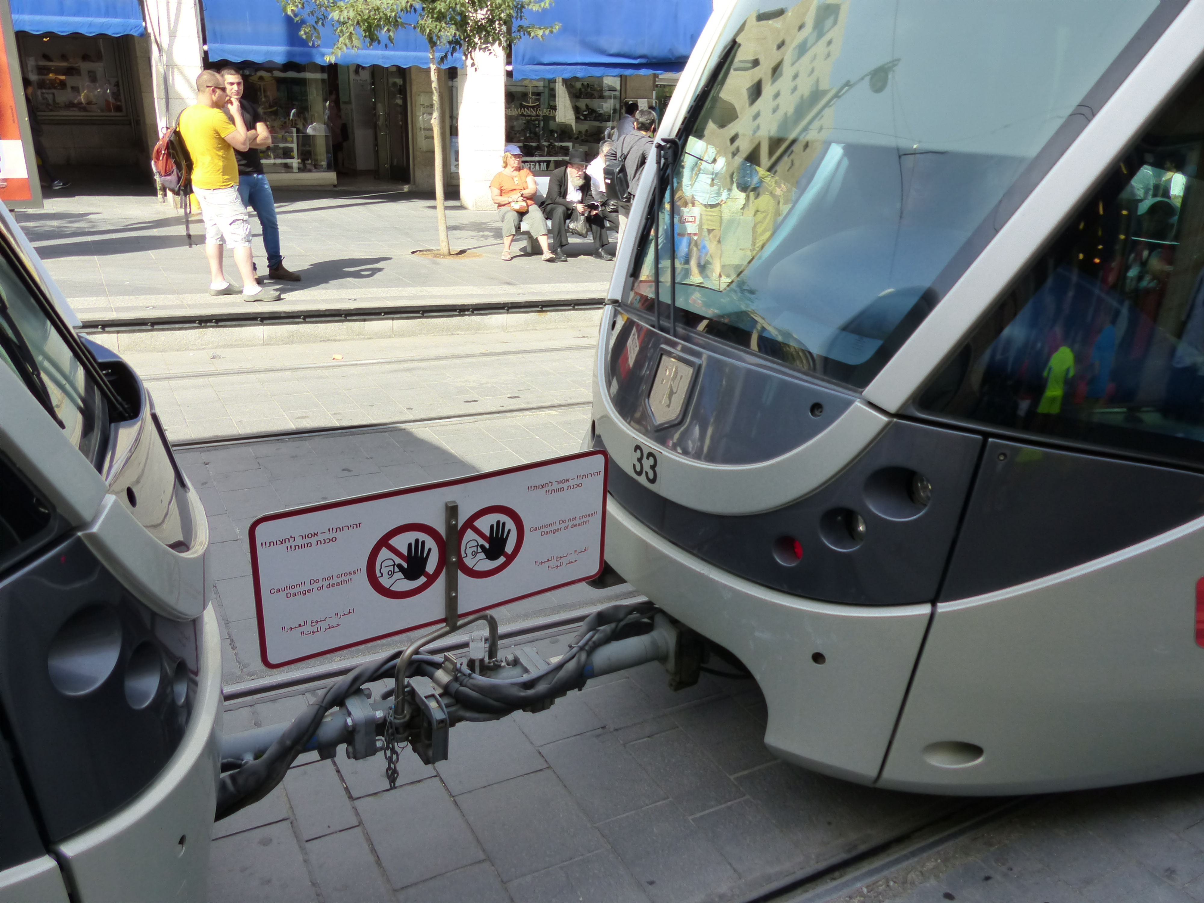 Attelage permanent de deux Citadis 302 constituant des rames standard du Tramway de Jérusalem